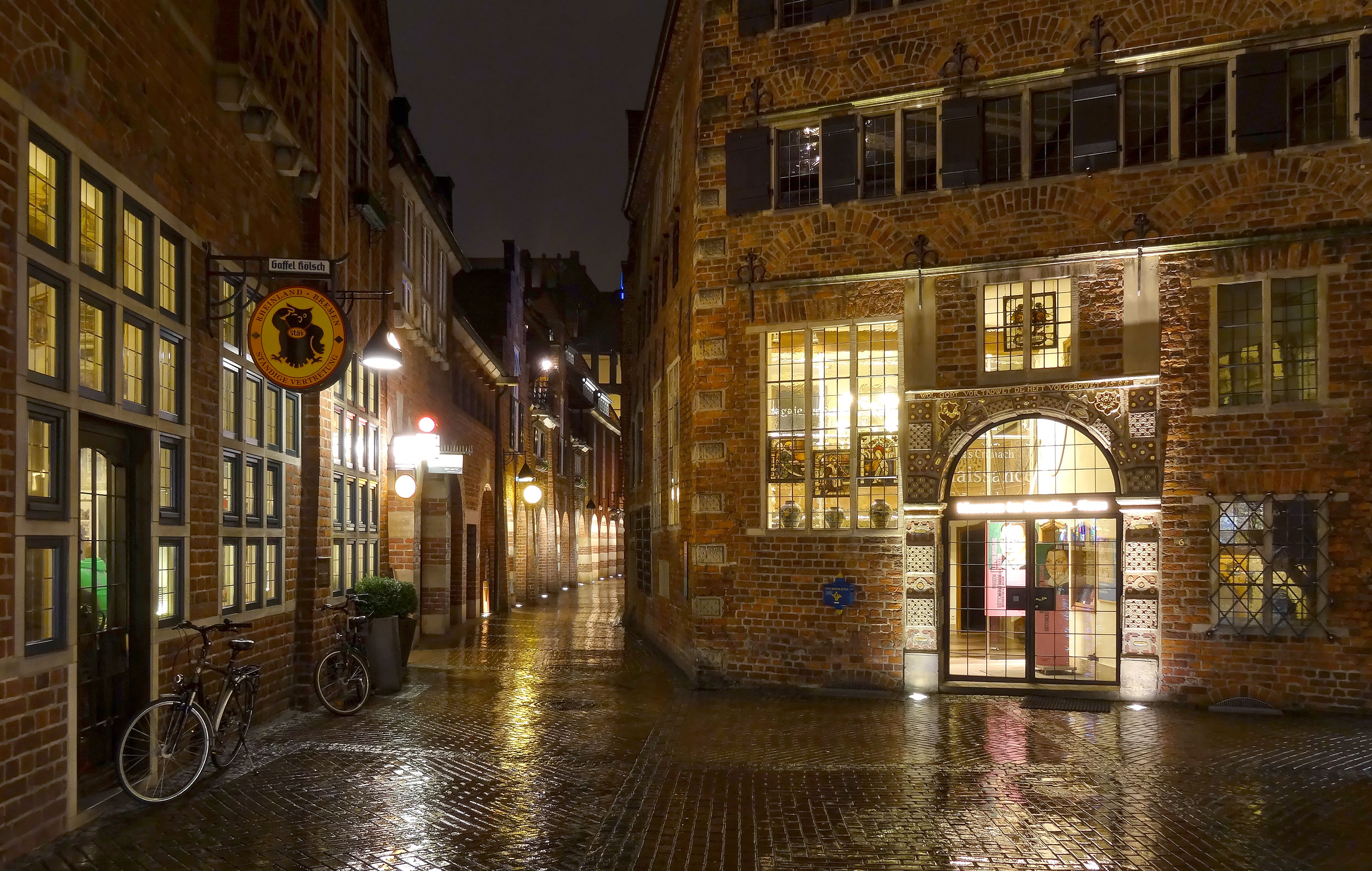 Böttcherstraße in Bremen